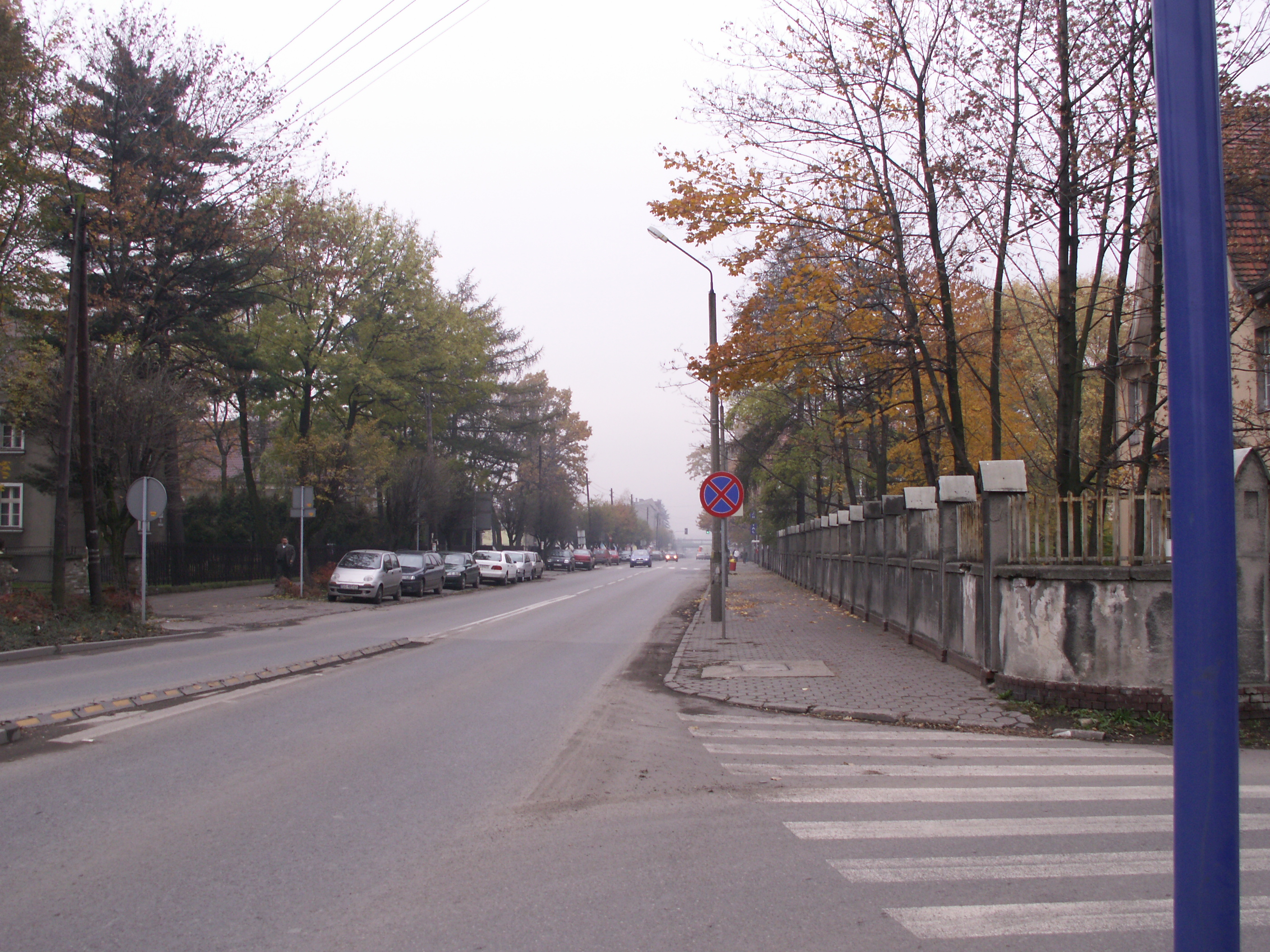 Fragment ulicy Niepodległości w Knurowie.